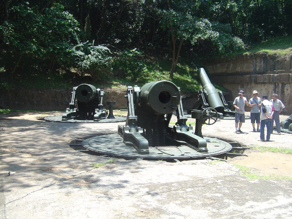 コレヒドール島要塞跡